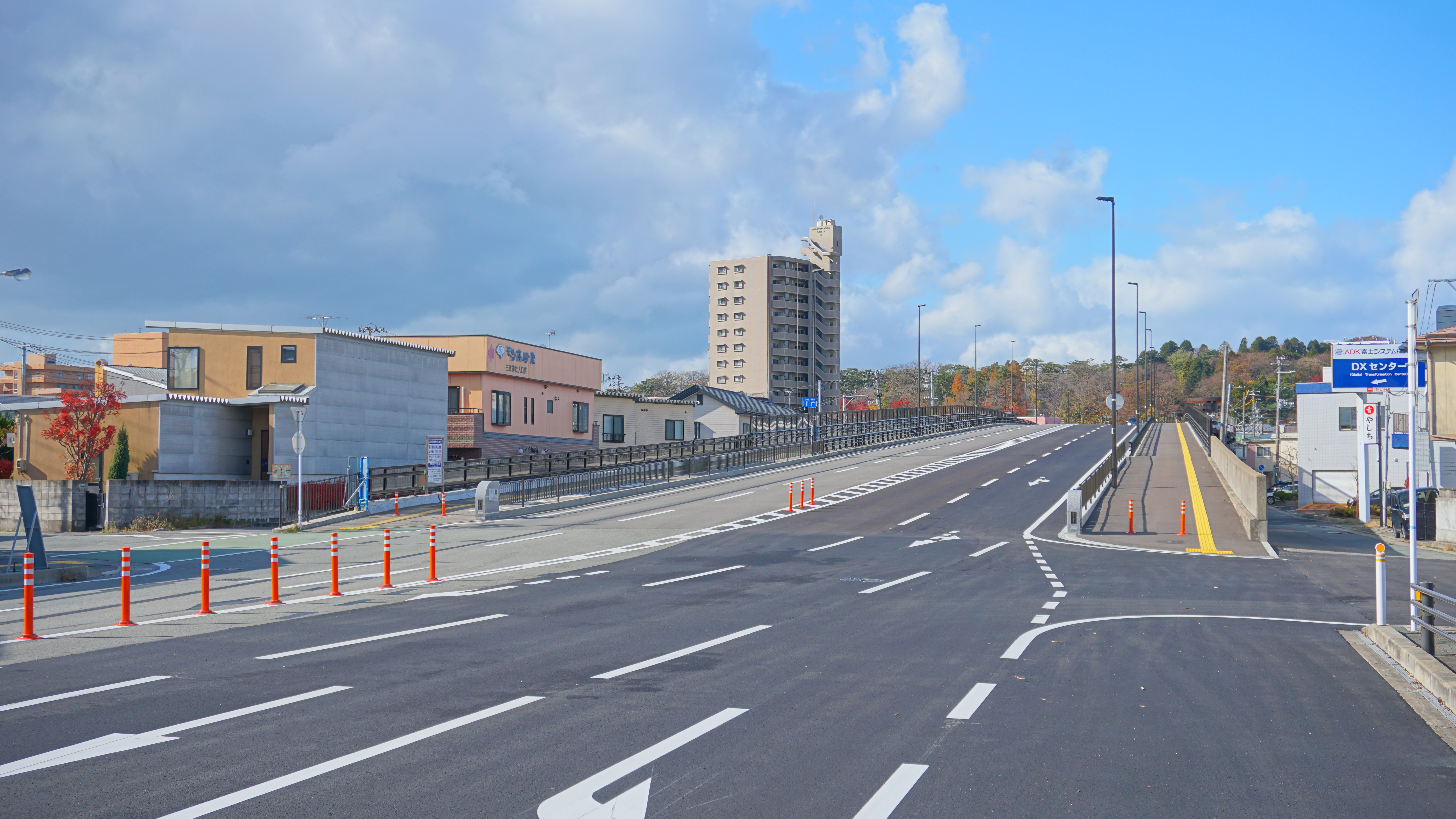 秋田県道28号秋田岩見船岡線、手形陸橋(手形山崎側より撮影)。長年に渡る4車線化工事が完成し、2019年11月17日より供用を開始した。